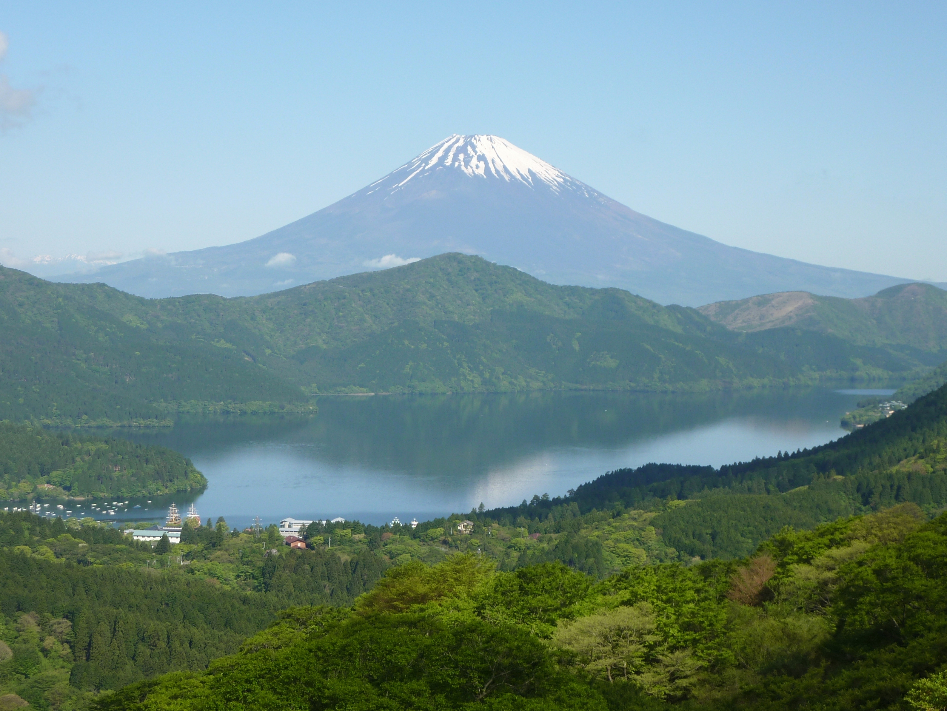 神奈川県箱根町・大観山より富士山と箱根外輪山と芦ノ湖を望む。駐車場からではなく椿ラインの路肩から撮影。